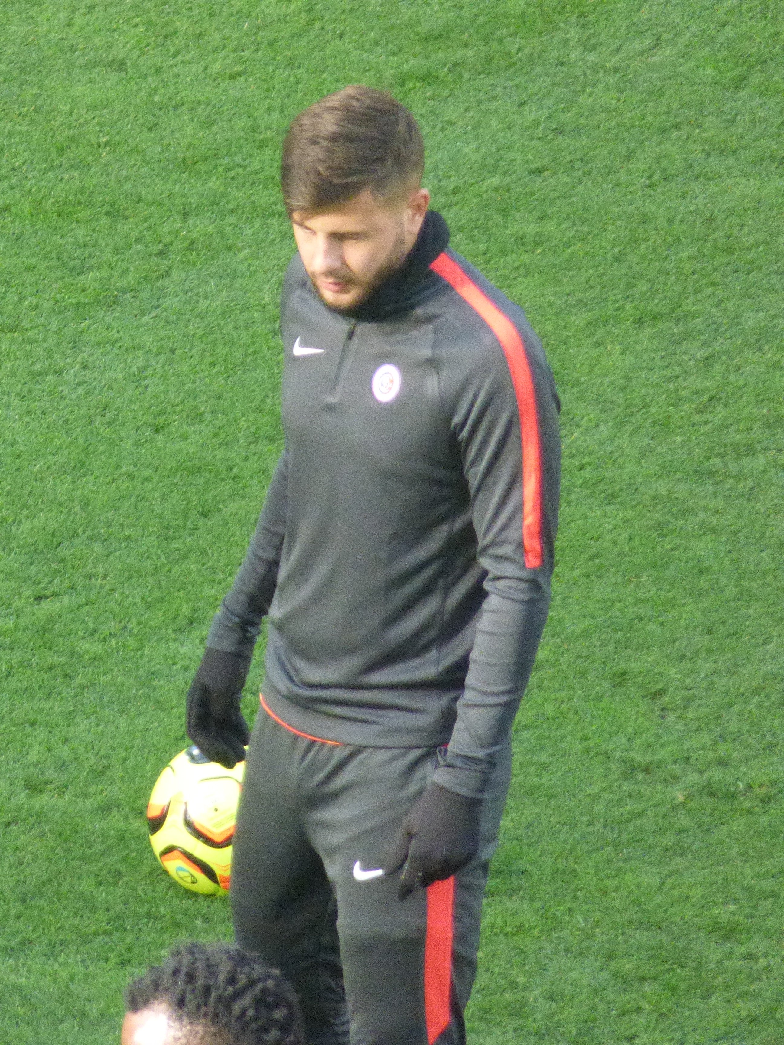 Valentin Vanbaleghem avant le match RC Lens / LB Châteauroux, le 3 novembre 2018, comportant pour la treizième journée du championnat de France de football de Ligue 2, au Stade Bollaert-Delelis.